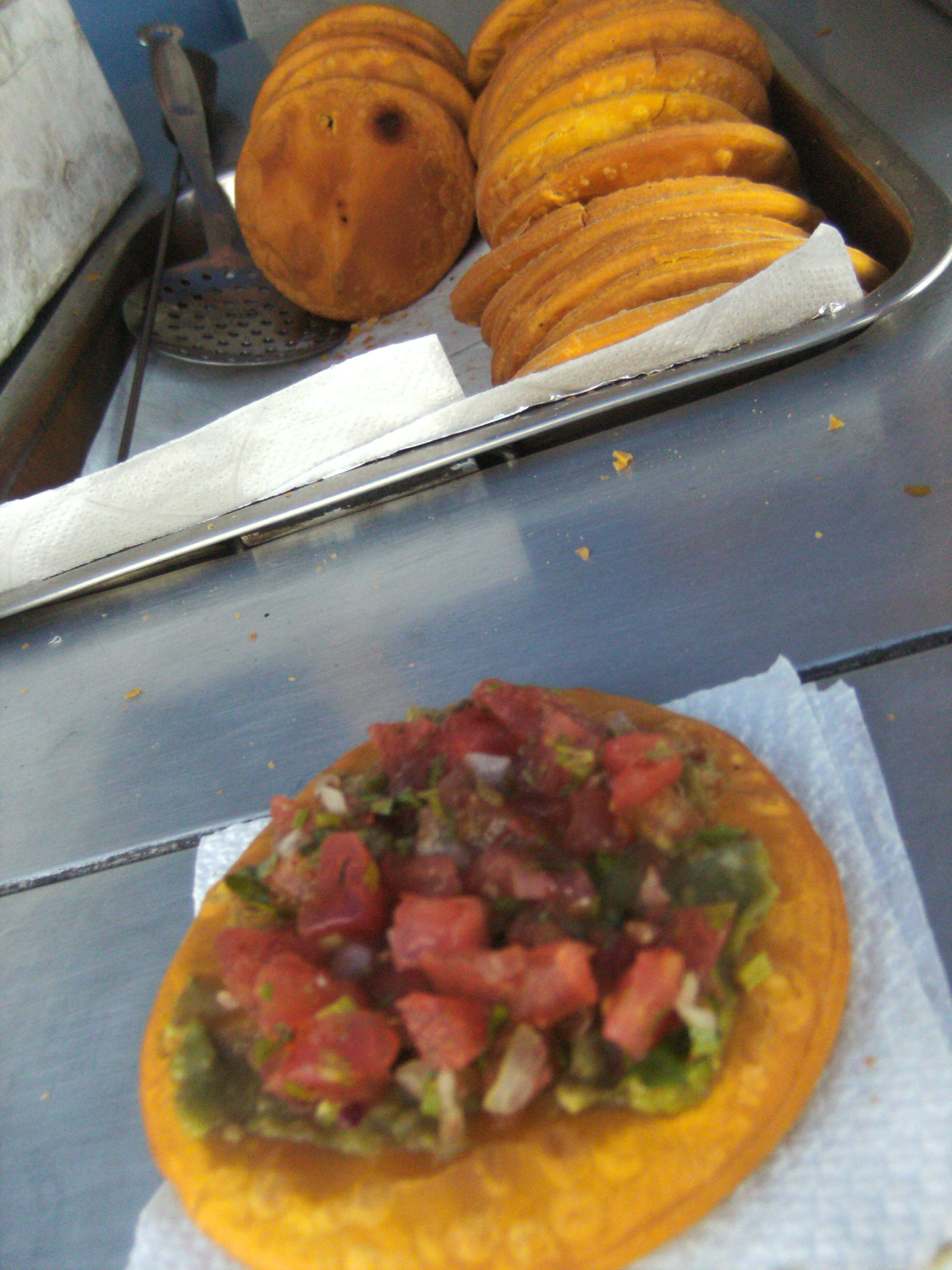 Sopaipilla de carro en Barrio universitario de San Jaoquín en Santiago de Chile